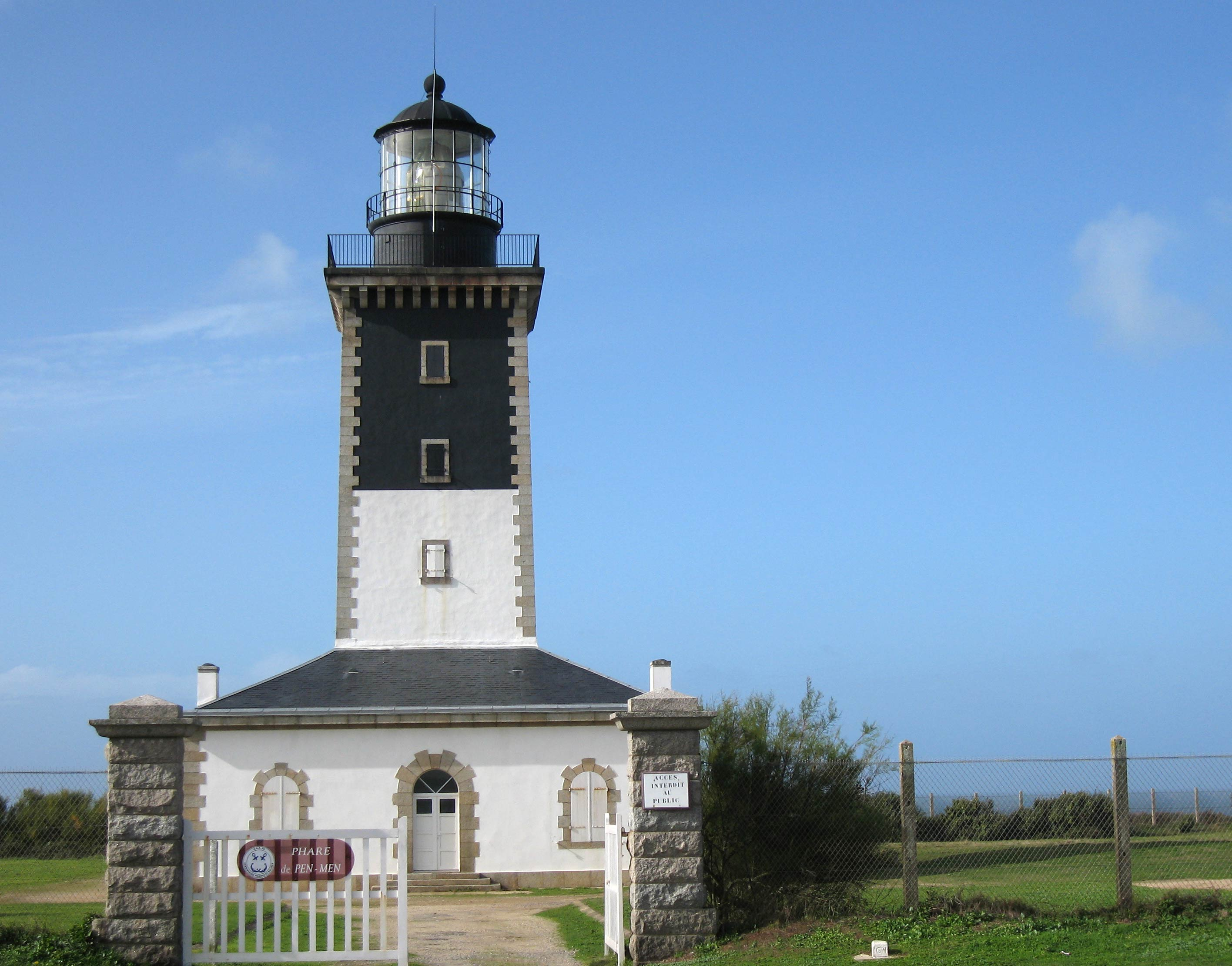 Phare de Pen Men, Ile de Groix, Bretagne, France